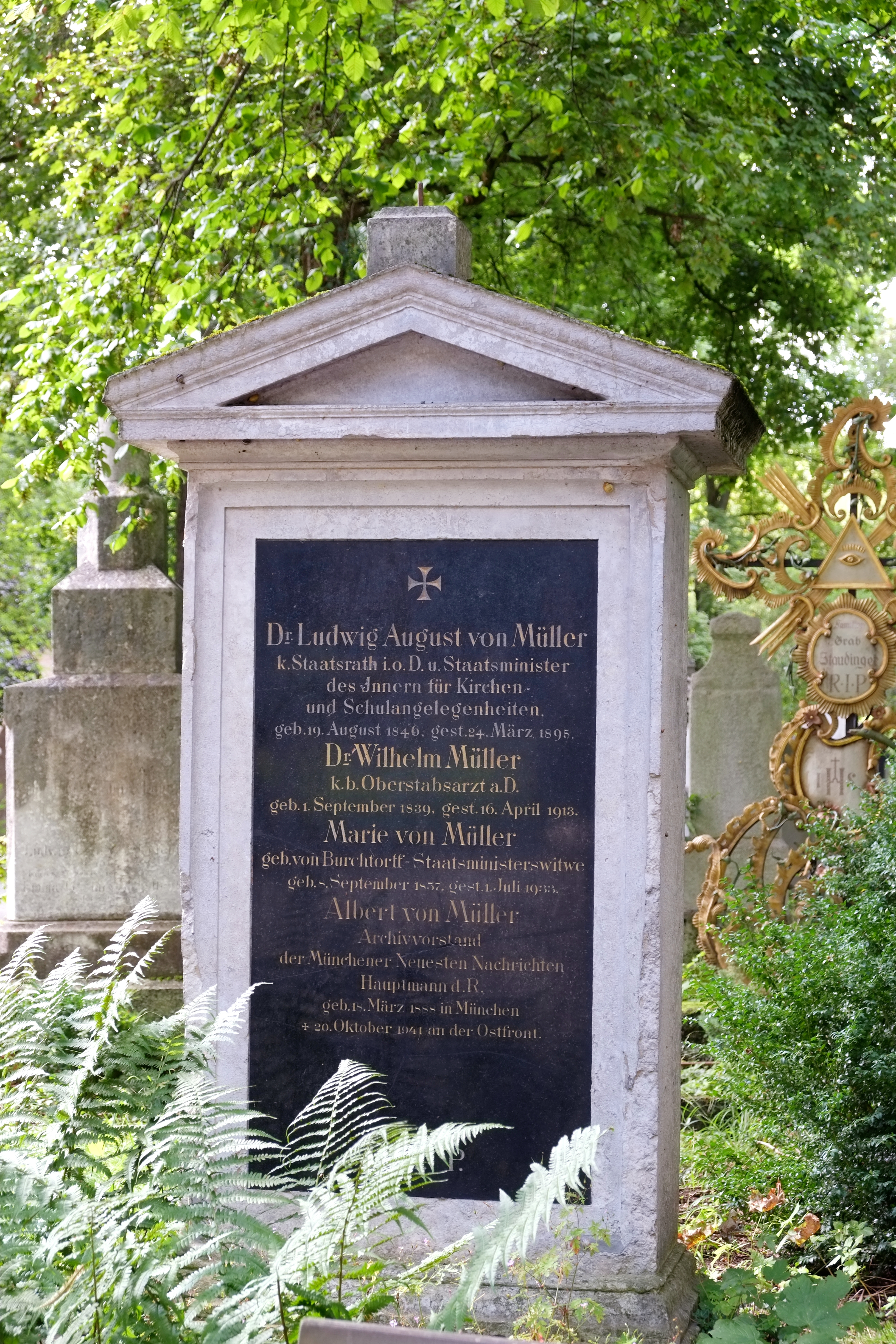 Grabstein für Ludwig August von Müller und Familienmitglieder auf dem Alten Südfriedhof in München (Bayern, Deutschland)